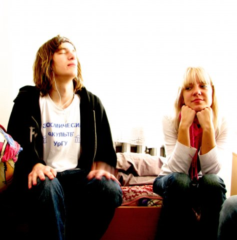 Утро на одной из турбаз.